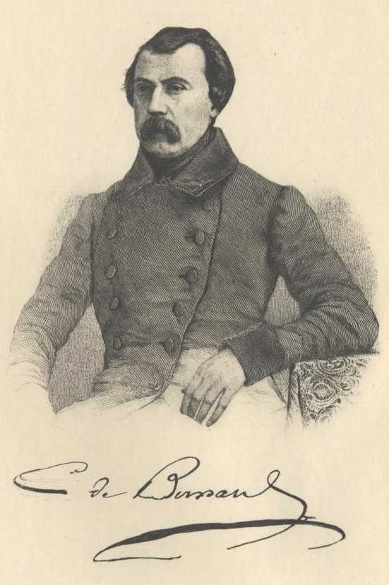 French novelist Charles de Bernard (1804-1850) a.k.a. Pierre-Marie-Charles de Bernard Du Grail de la Vilette